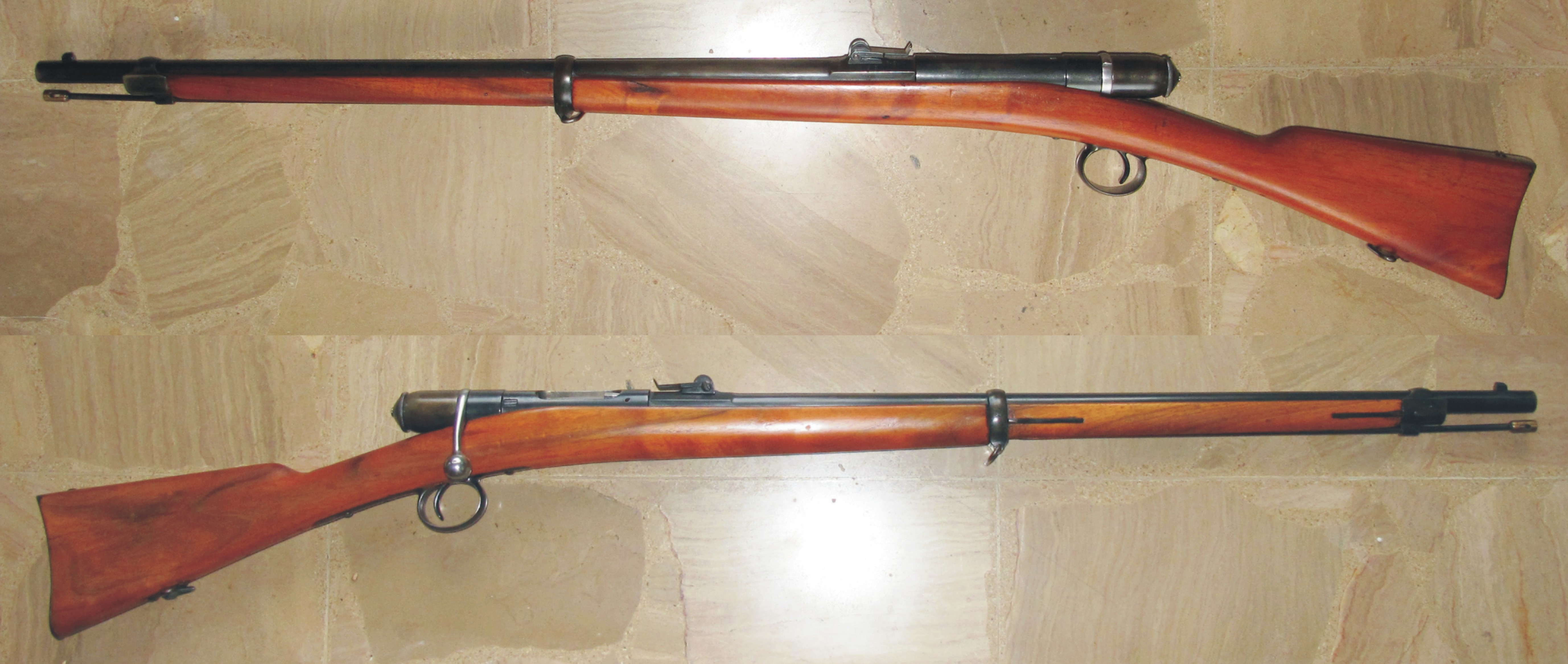 Fusil Vetterli modèle de 1870 pour les cadets.